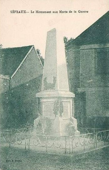 Monument aux morts de Sépeaux (Yonne)